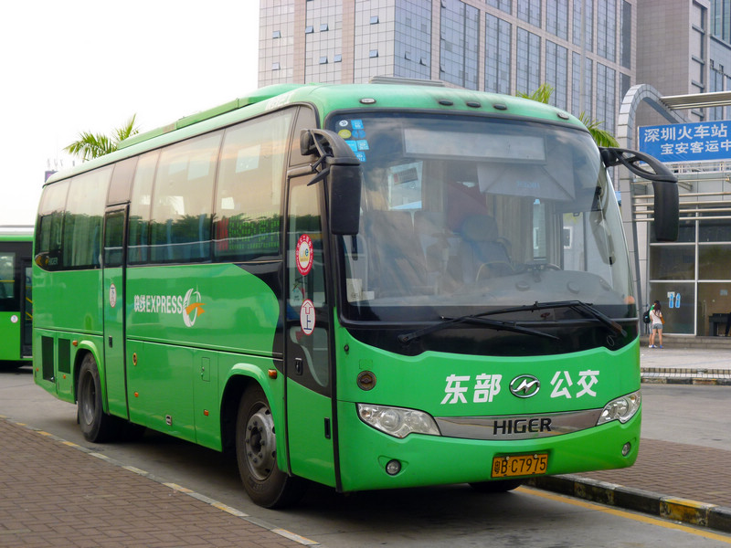 中文（中国大陆）: 深圳公交M385路的海格KLQ6920QE3